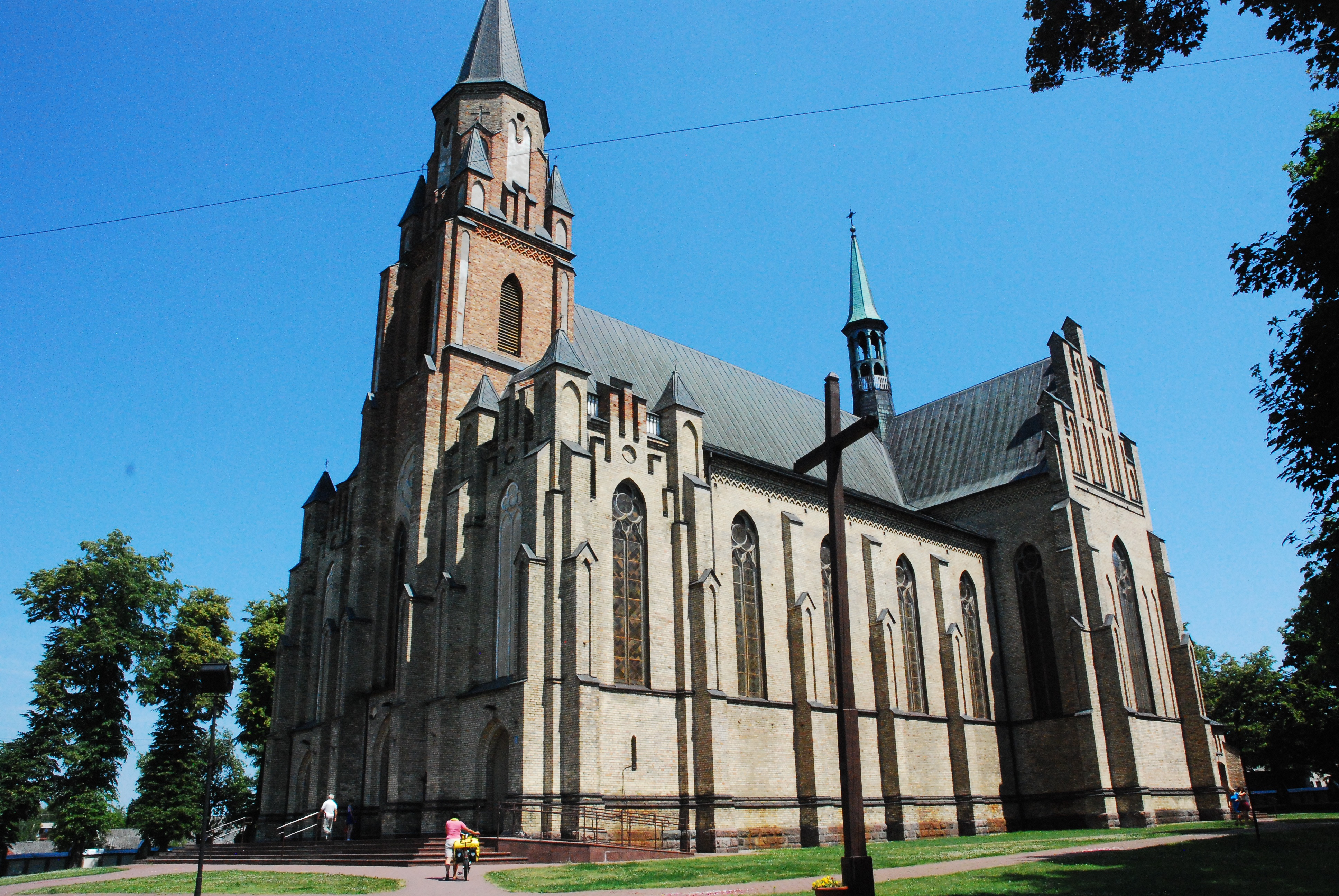 Kosów Lacki - rzymskokatolicki kościół parafialny pw. Narodzenia NMP, 1907